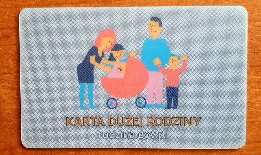 Karta Dużej Rodziny KDR rewers